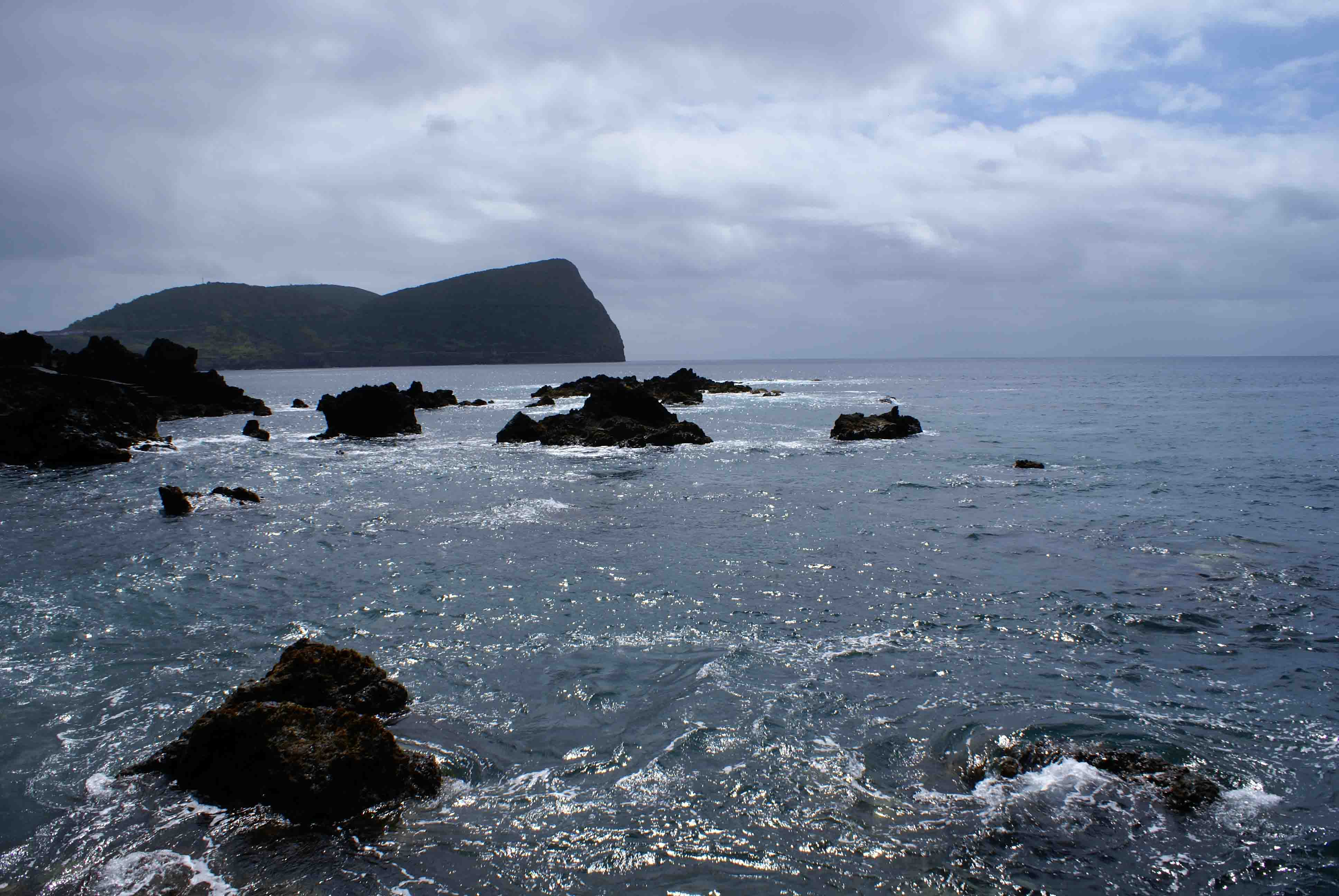 Zona Costeira da Baía de Villa Maria, o Monte Brasil ao fundo, ilha Terceira, Açores, Portugal